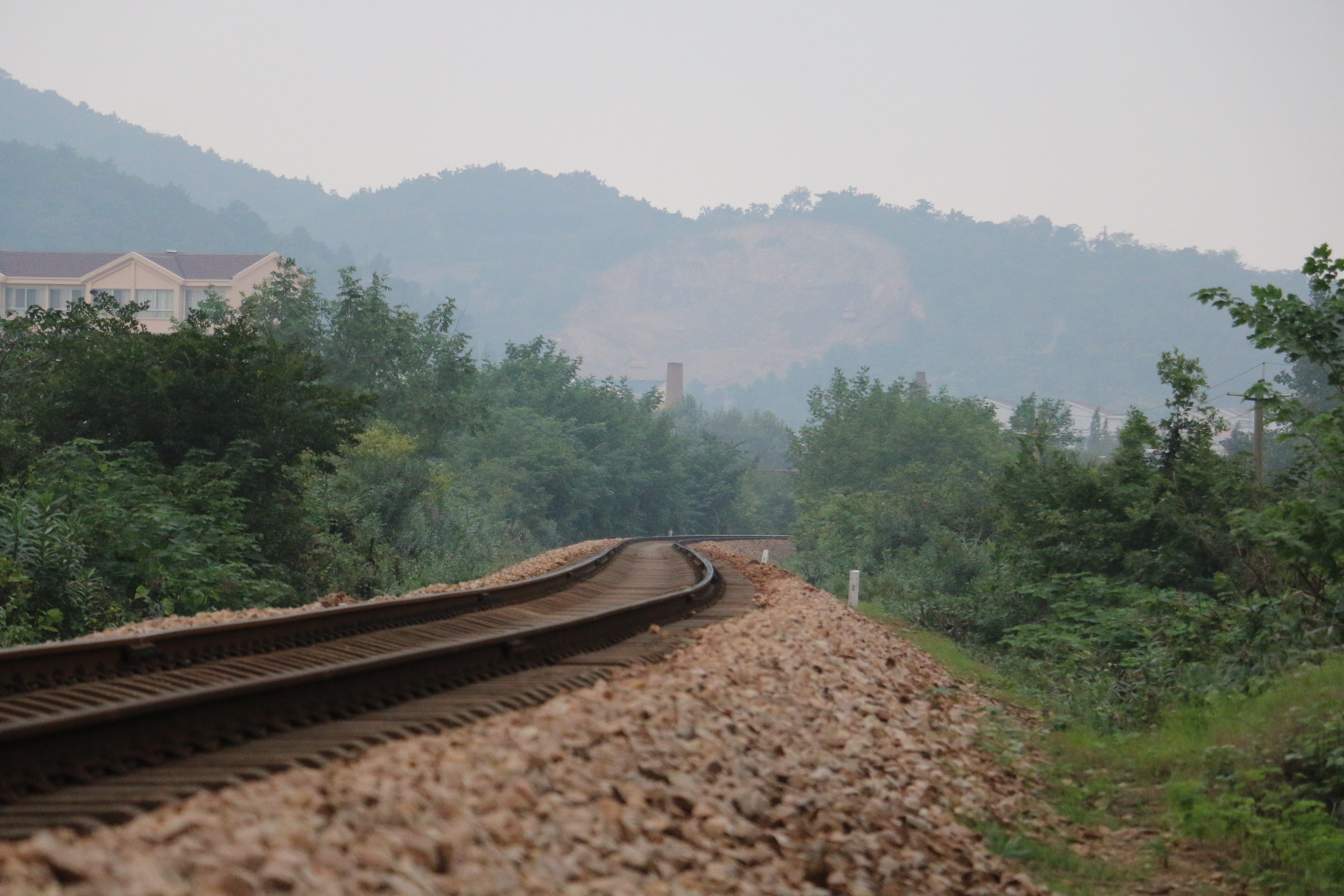 中文（中国大陆）: 新长铁路于宜兴市川埠镇